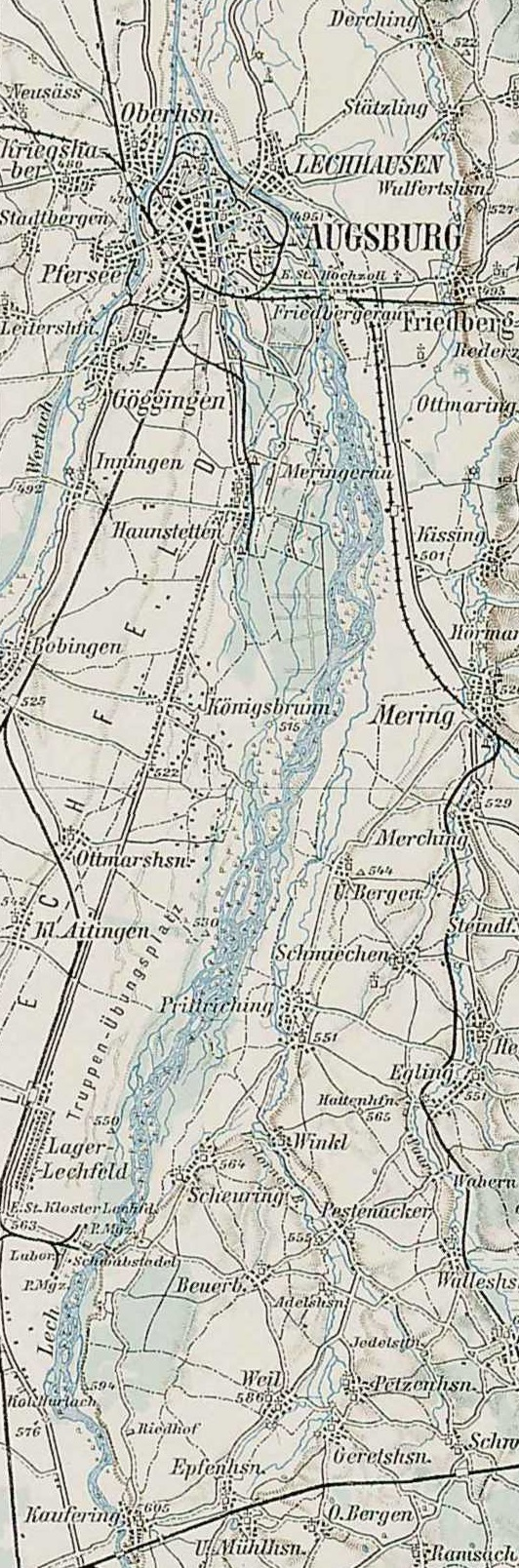 Der Lech zwischen Landsberg und Augsburg. Ausschnitt aus der Generalkarte von Mitteleuropa 1:200.000 der Franzisco-Josephinischen Landesaufnahme, Österreich-Ungarn